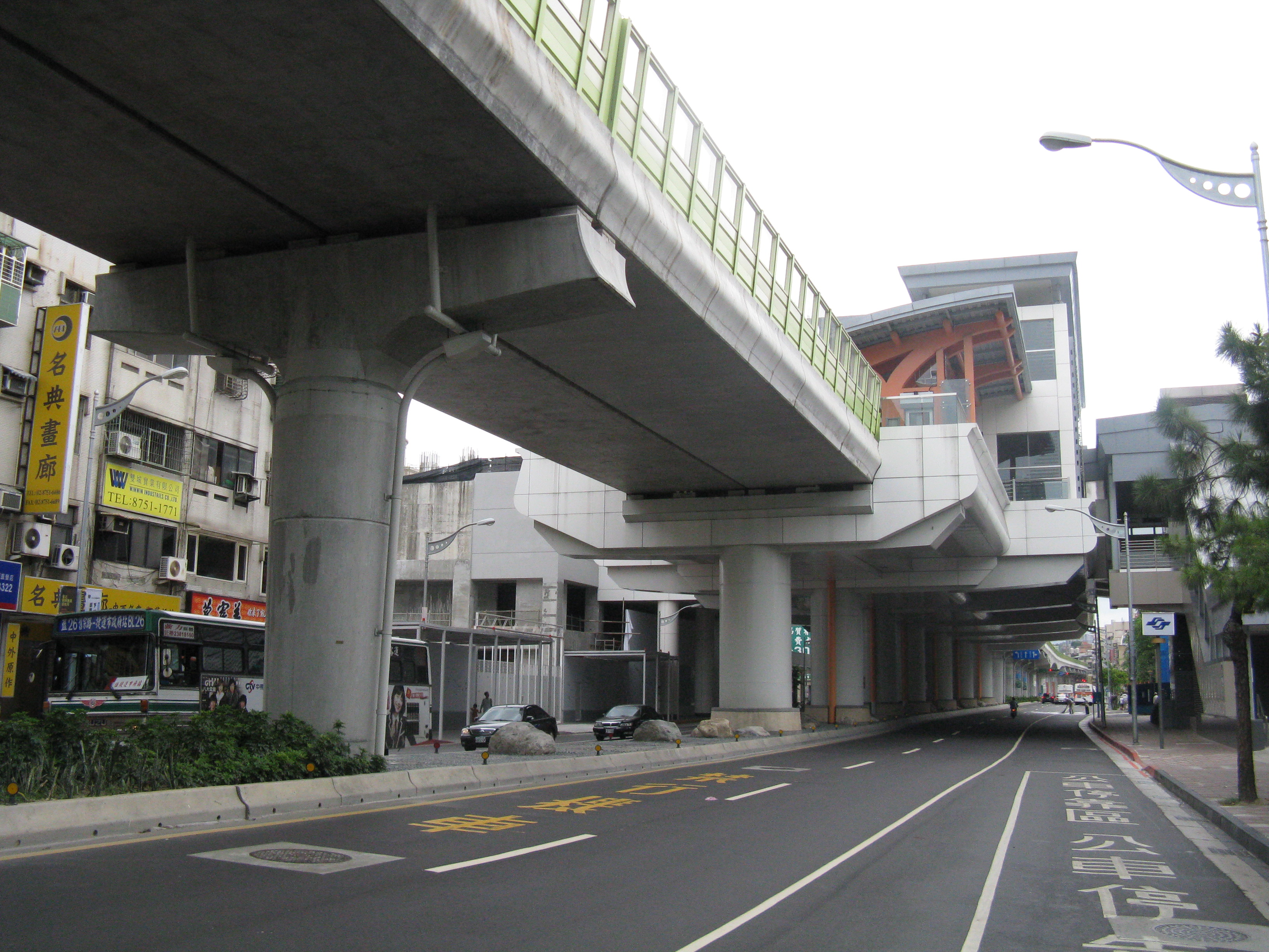 台北捷運内湖線港墘駅駅舍